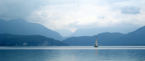 Vue panoramique du Lac d'Annecy en France dans le département de la Haute-Savoie.